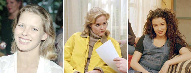 Linda, Roos & Jessica (Babette van Veen, Guusje Nederhorst en Katja Schuurman)